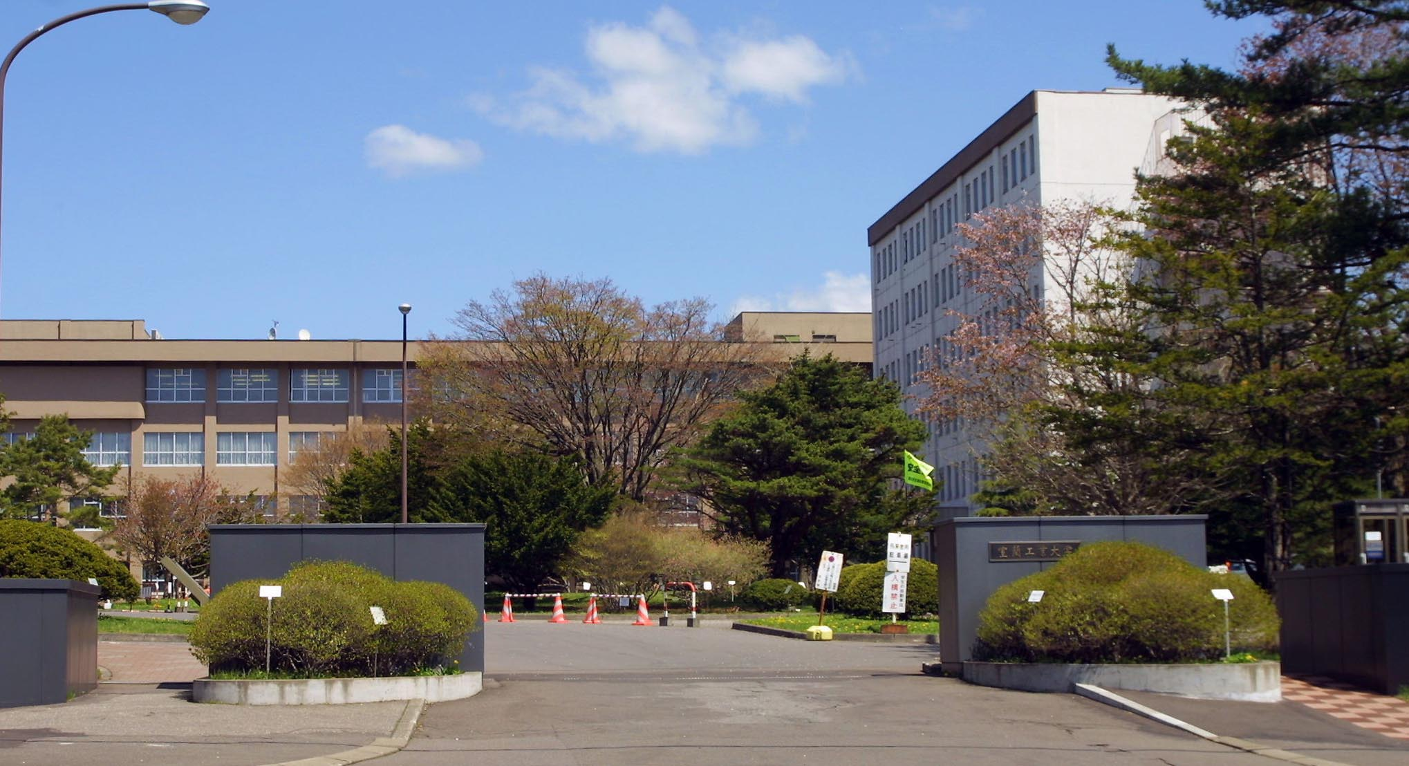 室蘭工業大学「正門」. /撮影位置: 北海道室蘭市、室工大正面。 /撮影日: 2004年 /撮影者: 本学職員 /画像形式: JPEG形式・984x535ピクセル・色数70bit。